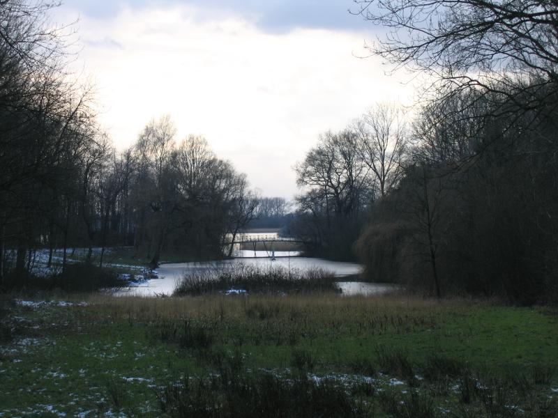 Blankaart Kasteelvijver in de winter in Woumen, een dorp in de Belgische provincie West-Vlaanderen.